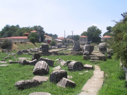 tempel Athena Alea in Tegea